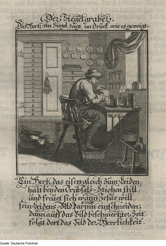 Original image description from the Deutsche Fotothek Ständebuch & Beruf & Handwerk & Stempelschneider & Siegelschneider & Petschierer & Petschaftschneider & Siegel & Petschaft & Stempel & Graveur